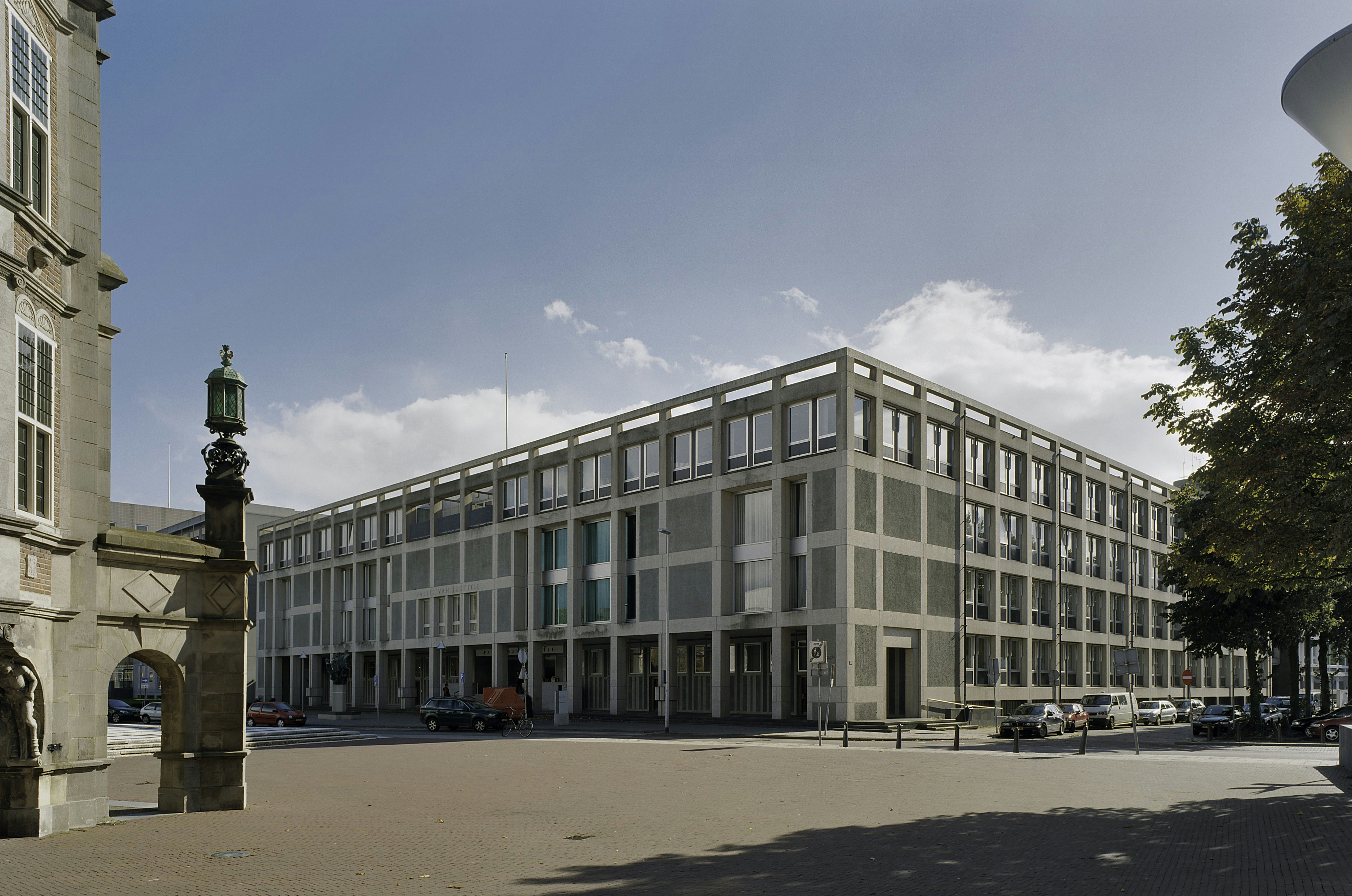 Paleis van Justitie: Interieur, overzicht van de voorgevel en de rechter zijgevel